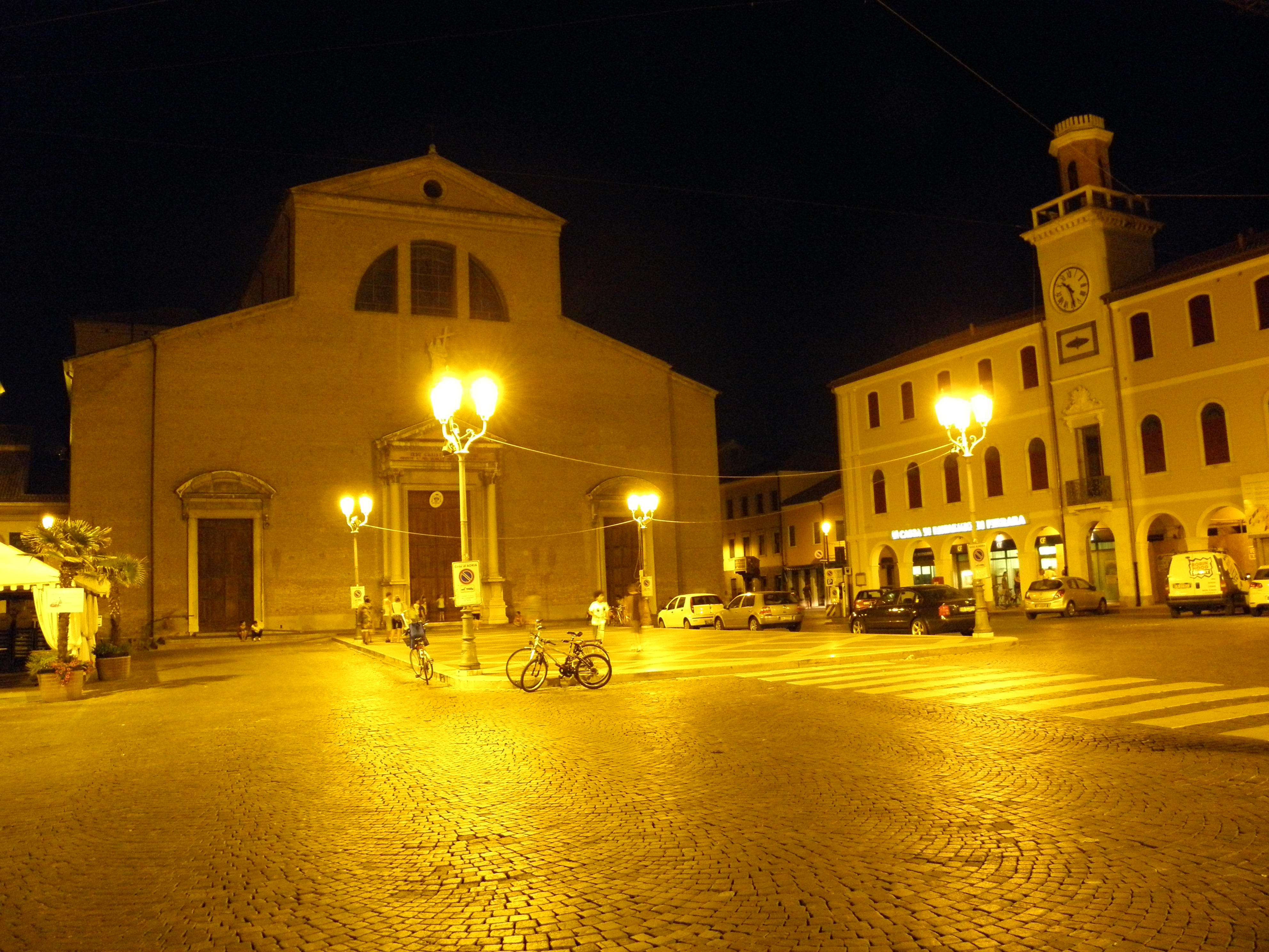 Adria: vista notturna della Piazza Garibaldi con a sinistra il Duomo o Chiesa Cattedrale dei Santi Pietro e Paolo, ed a destra il Palazzo dell'Orologio.